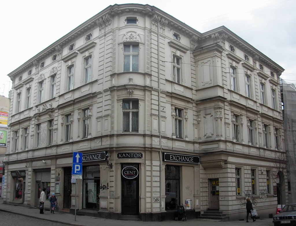 Kamienica ul. Dworcowa 39, róg Marcinkowskiego w Bydgoszczy